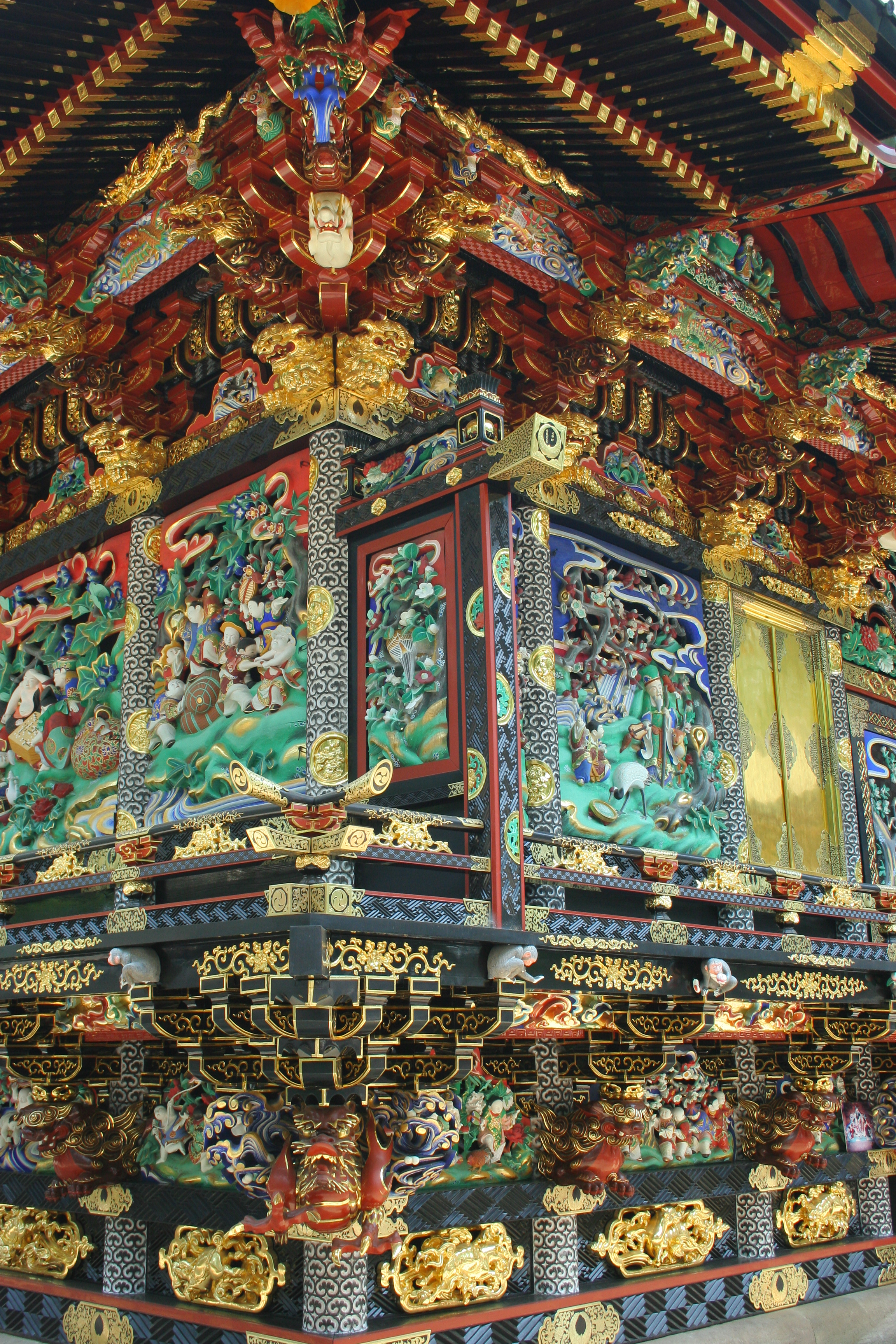 歓喜院の彫刻